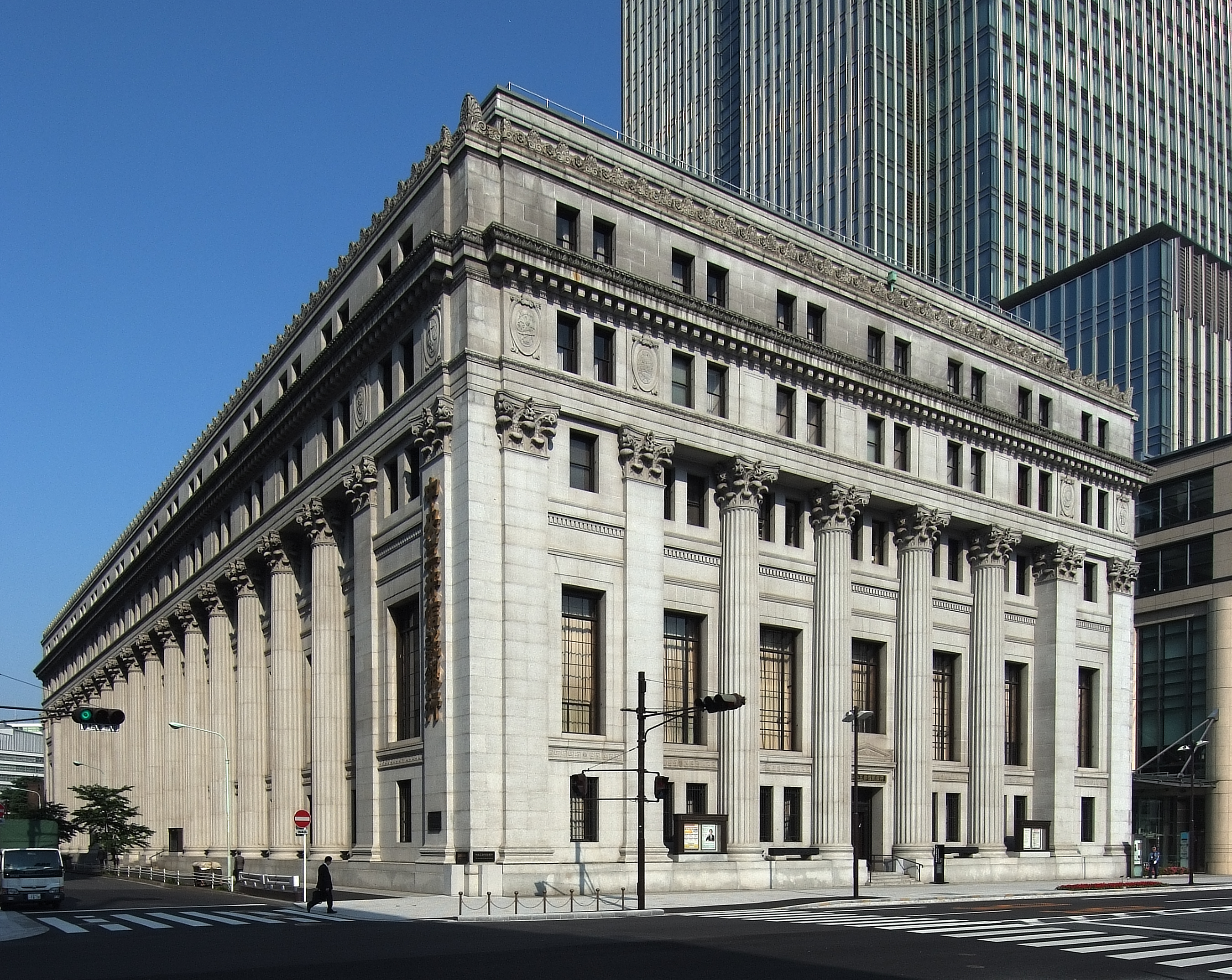 Mitsui Main Building, at Nihonbashi Tokyo Japan.